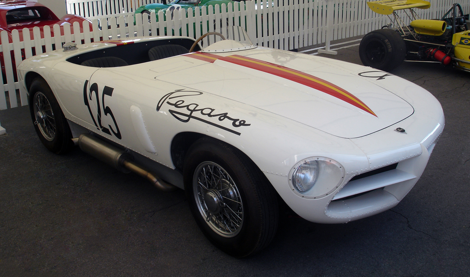 Pegaso Rabassada, exposat al festival Martini Legends (commemoració del 75 aniversari del Circuit de Montjuïc)